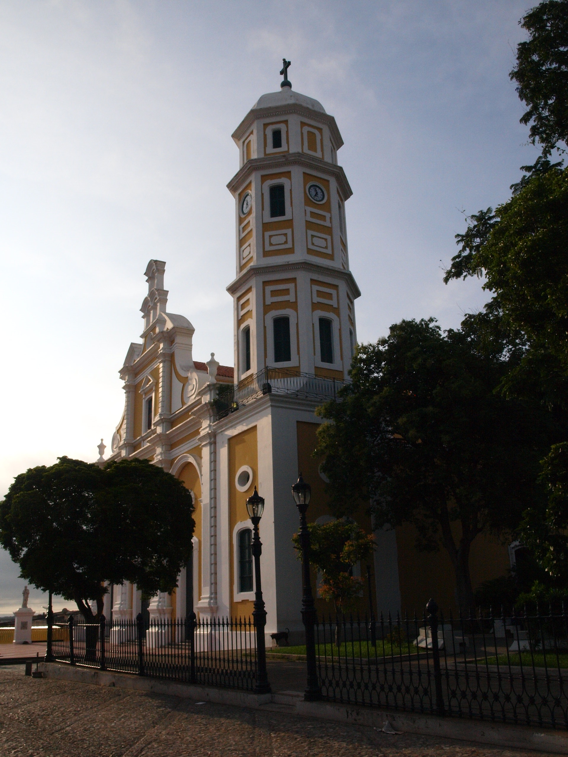 Iglesia en Plaza Bolivar, Ciudad Bolivar